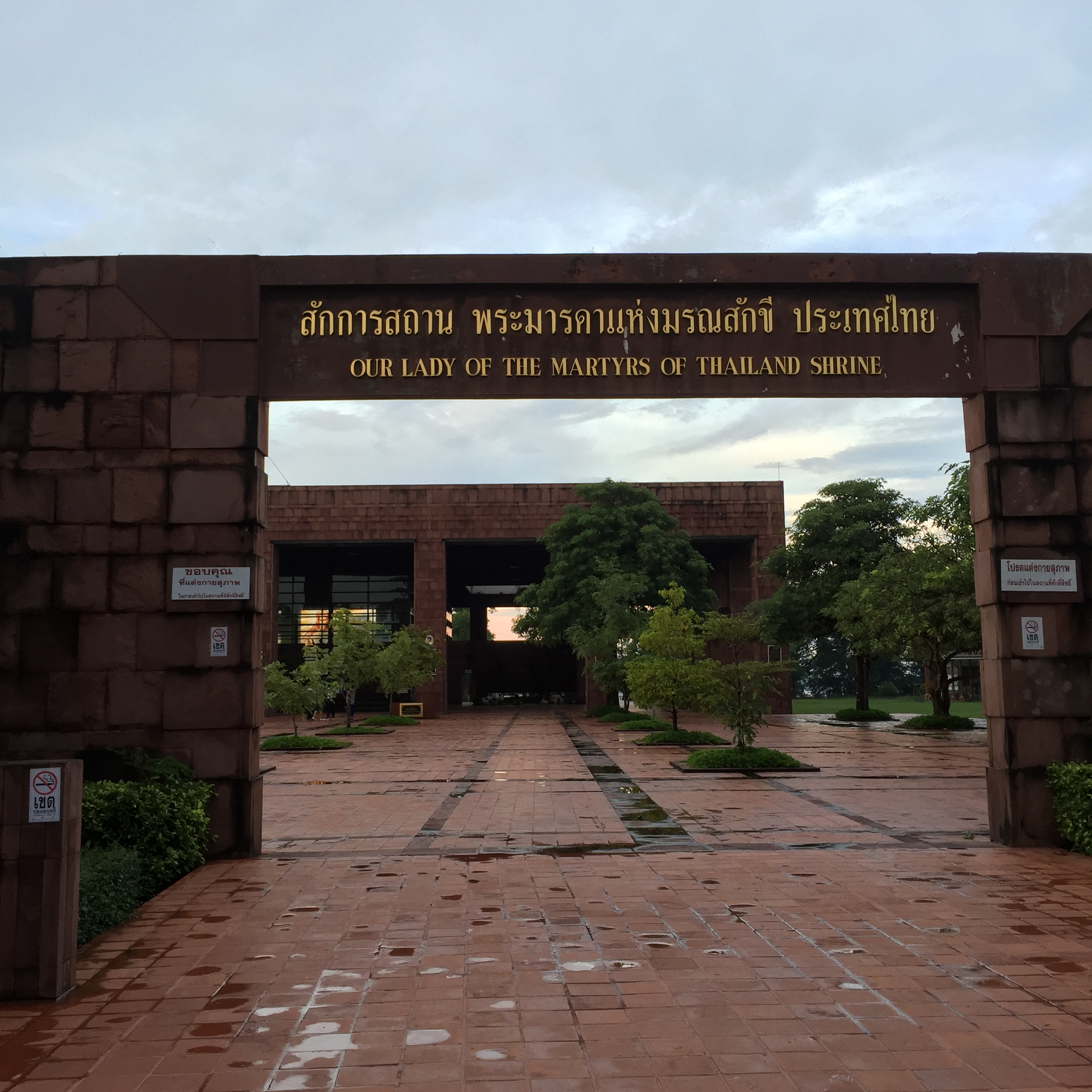 Pong Kham, Wan Yai District, Mukdahan 49150, Thailand